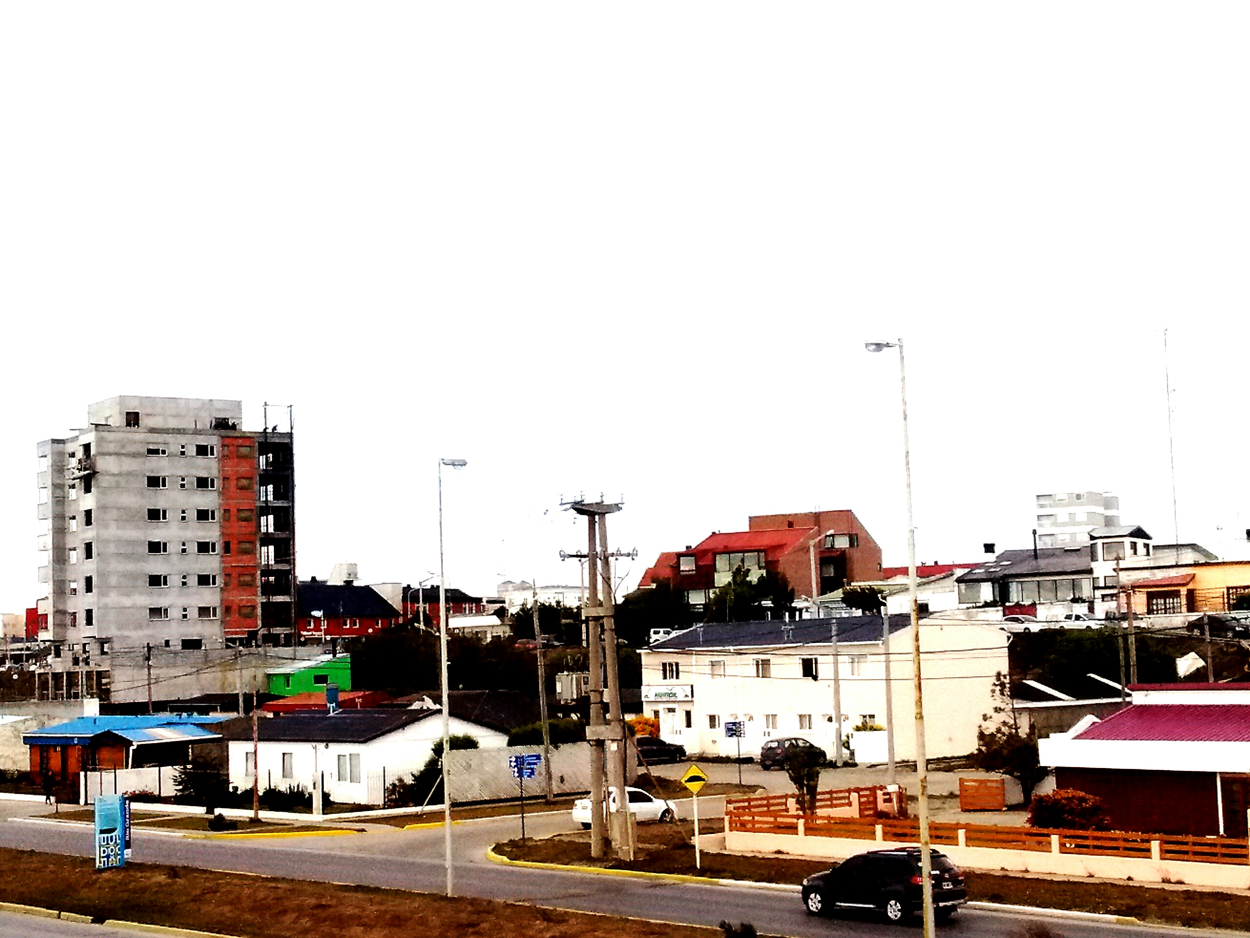 En los ùltimos años empezaron a aparecer edificaciones de altura en la ciudad